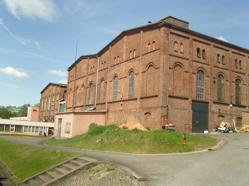 mine de charbon, ateliers du puits 2 de L'Hôpital